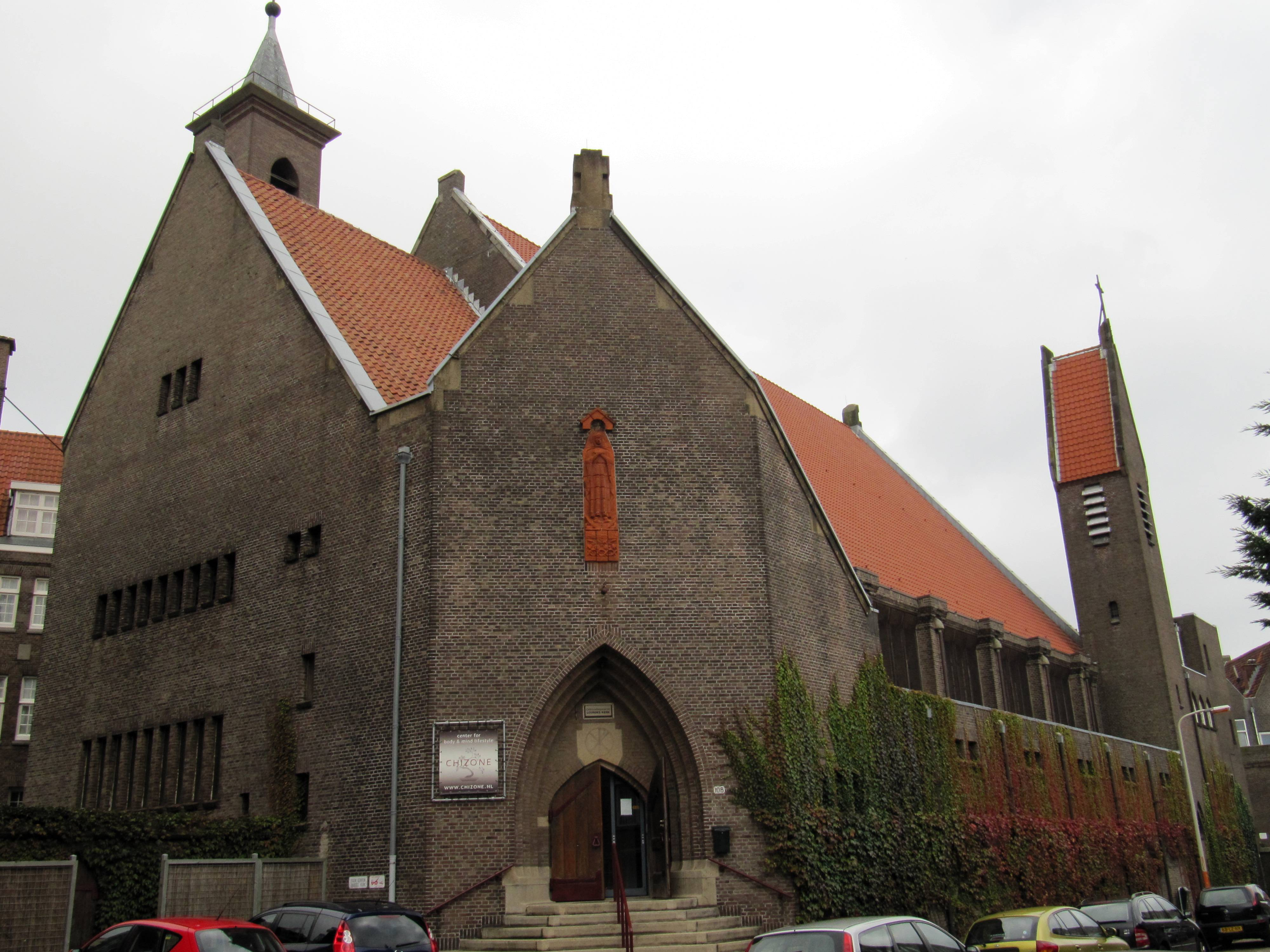 Den Haag 2de Messstraat 108 - De kerk van O.L. Vrouw van Lourdes